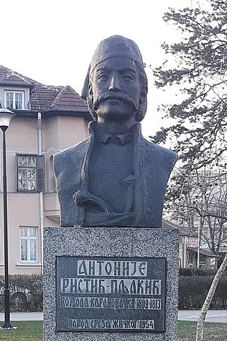 Парк Пљакин шанац налази се у непосредној близини Ибарског моста у Краљеву.